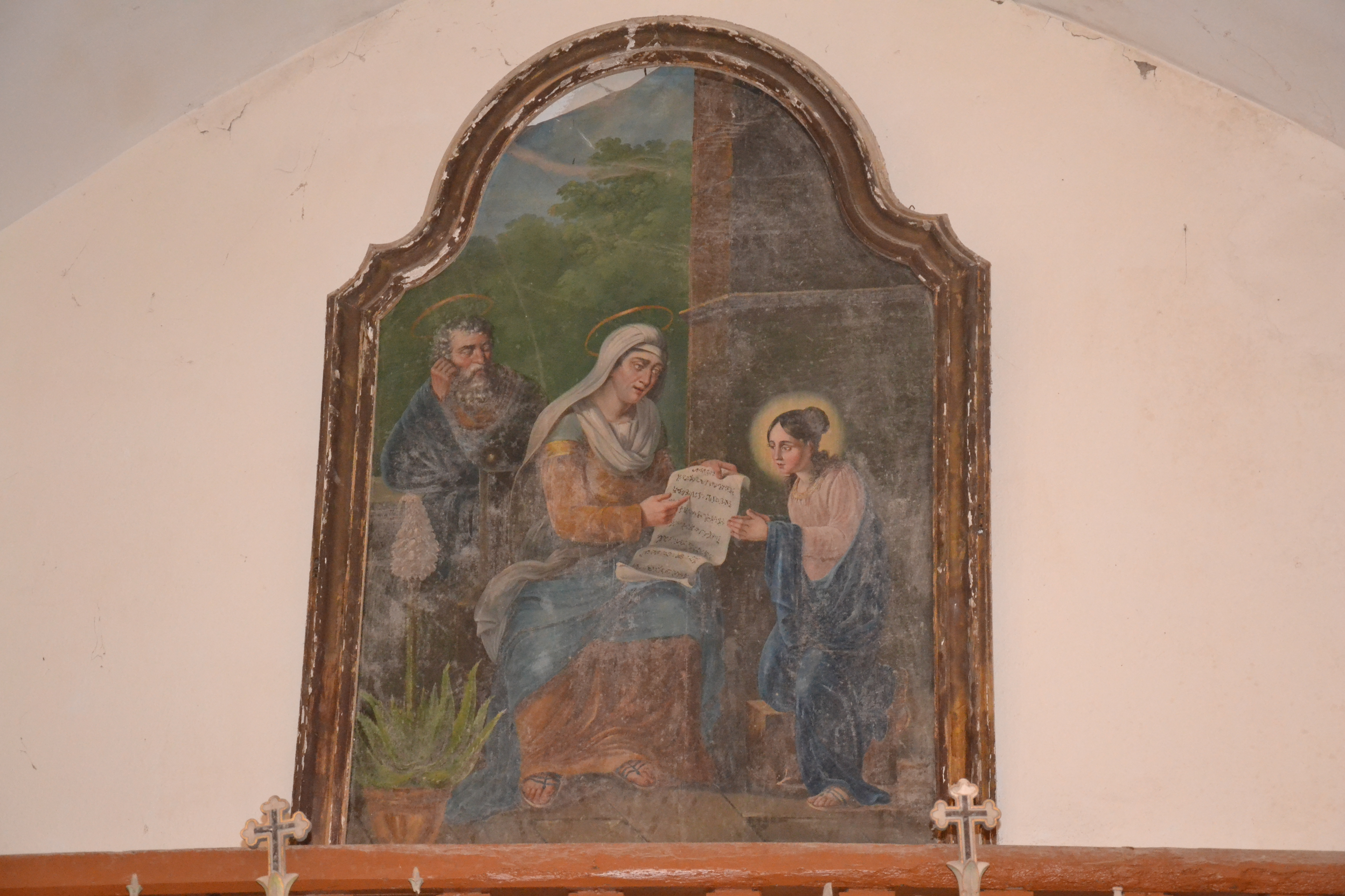 Tableau dédiée à Sainte-Anne (église de La Tourette-Cabardès)